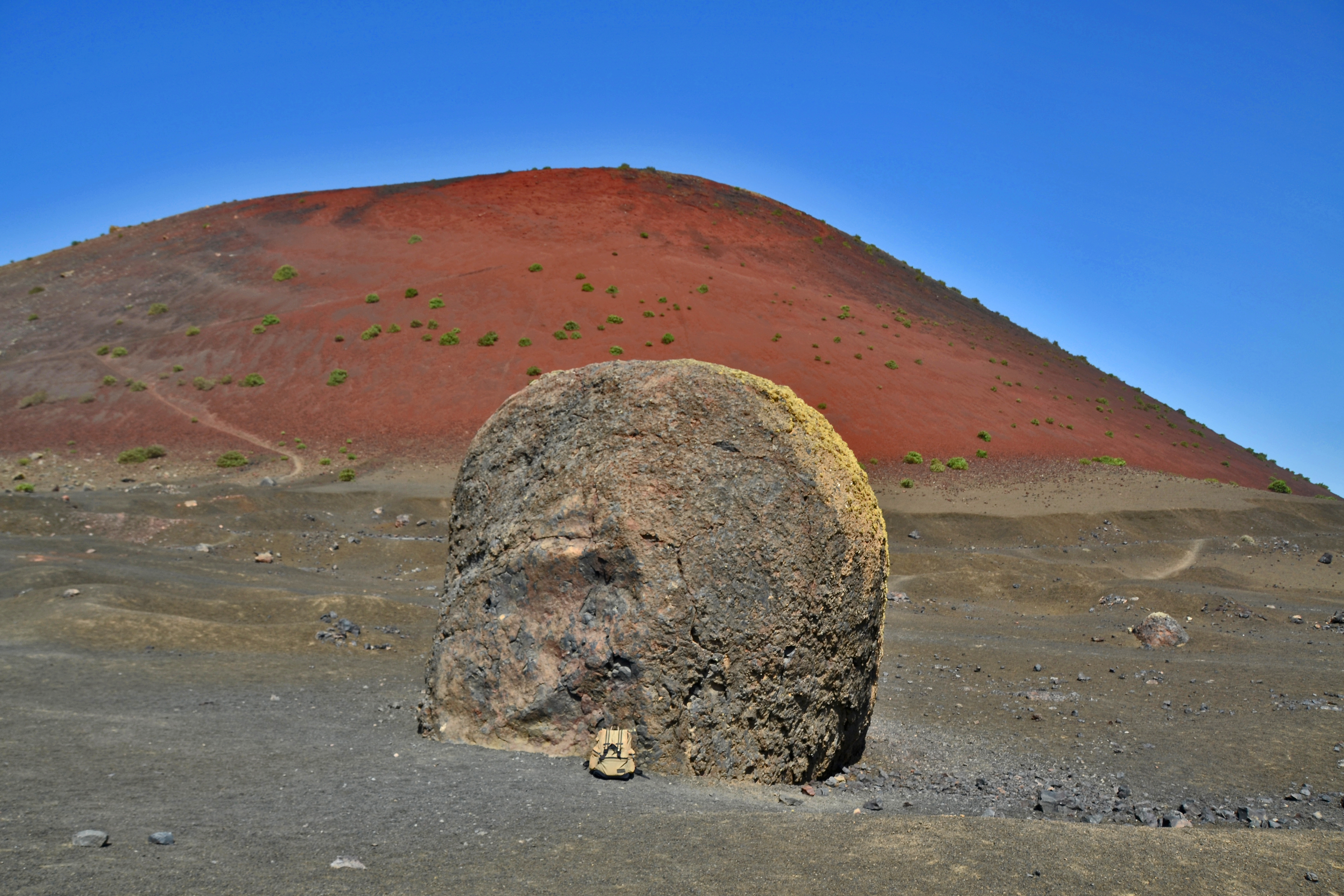 Lavabombe in der Caldera Colorada (Lanzarote)